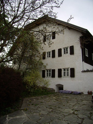 Freisitz Schifferhub, heute Villa Nussbaumerweg 6